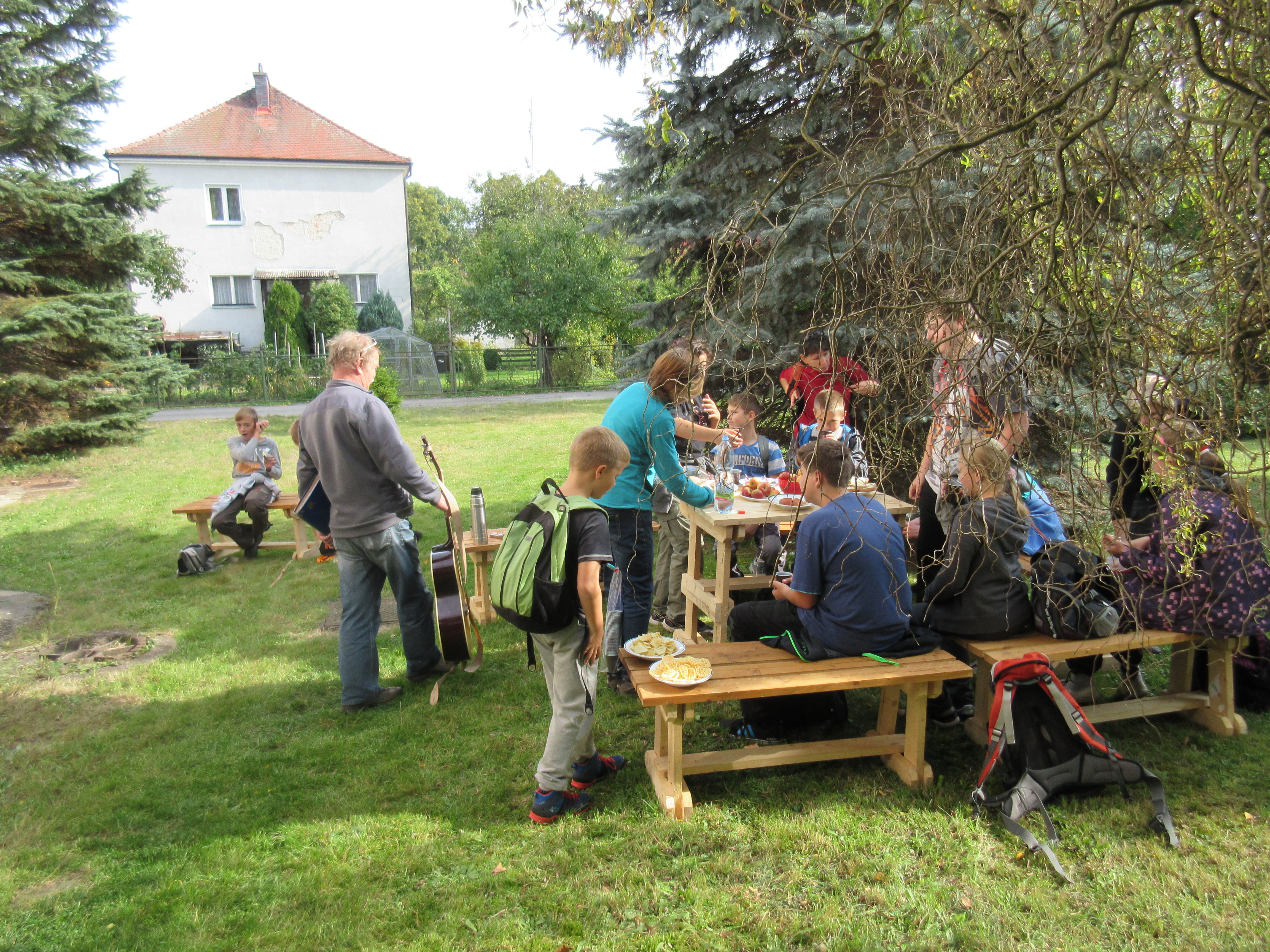 Turistická akce KČT Česká Lípa, děti v cíli na zahradě Adély